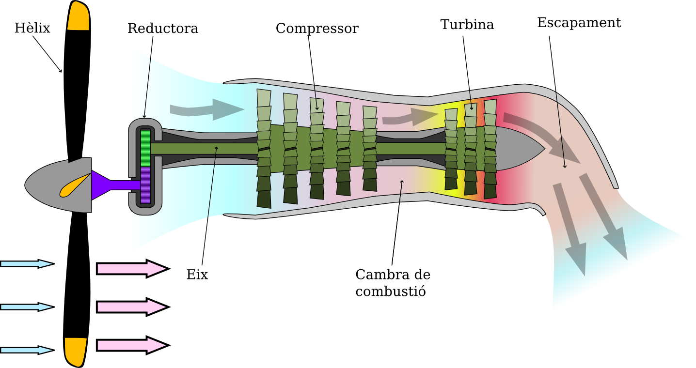 Parts d'un motor turbohèlix